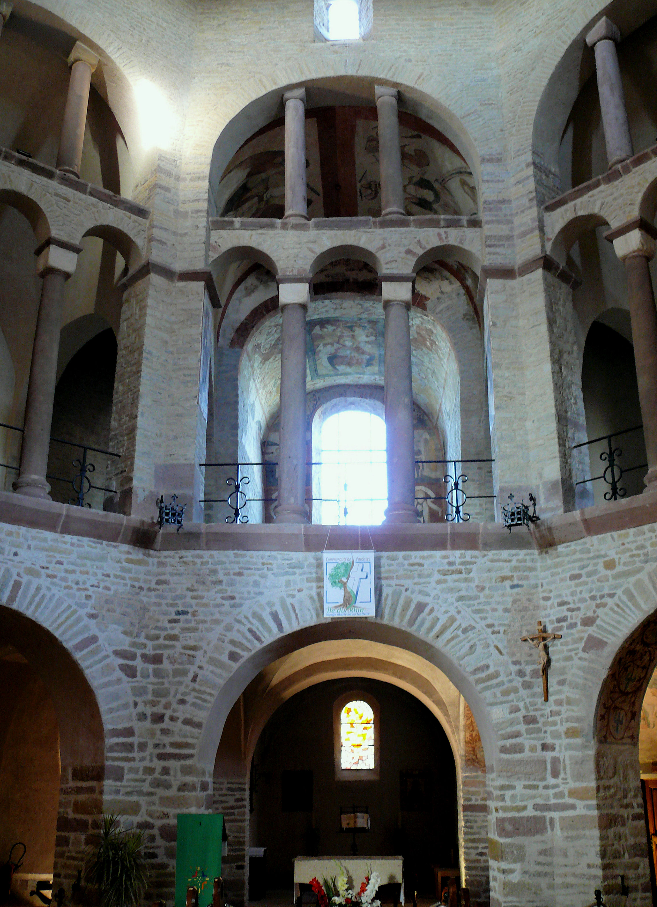 Ottmarsheim - Eglise Saint-Pierre-et-Saint-Paul - Intérieur